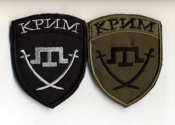 Польовi шеврони батальйону «Крим».